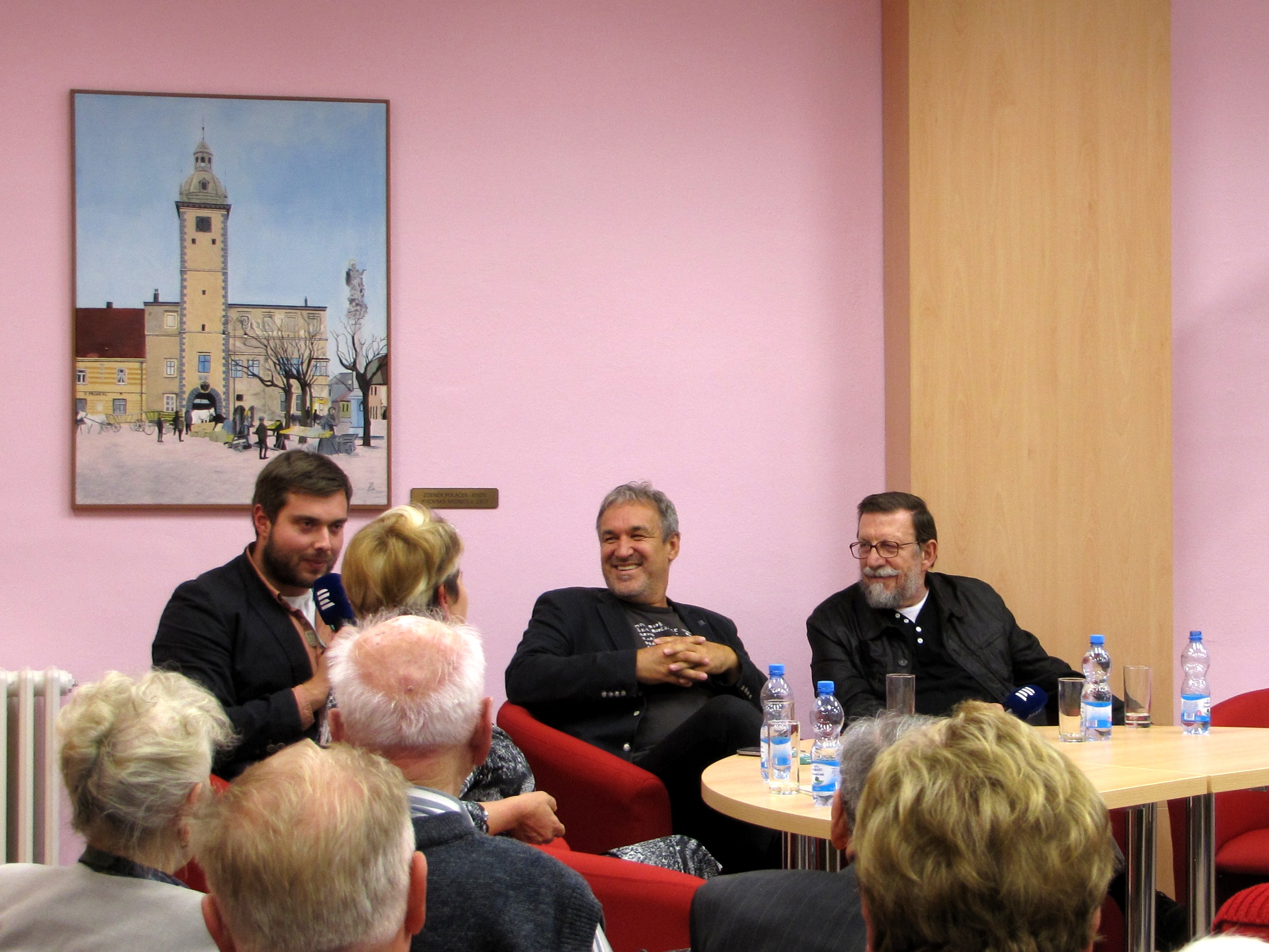 Beseda o rozhlasovém pořadu Českého rozhlasu Brno Toulky českou minulostí v kyjovské knihovně. Zleva: Jiří Kokmotos (moderátor besedy a redaktor Českého rozhlasu), Jaromír Ostrý (režisér a ředitel Českého rozhlasu Brno) a Josef Veselý (autor pořadu).